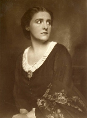 Schauspielerin Henny Porten auf einer Fotografie von Nicola Perscheid